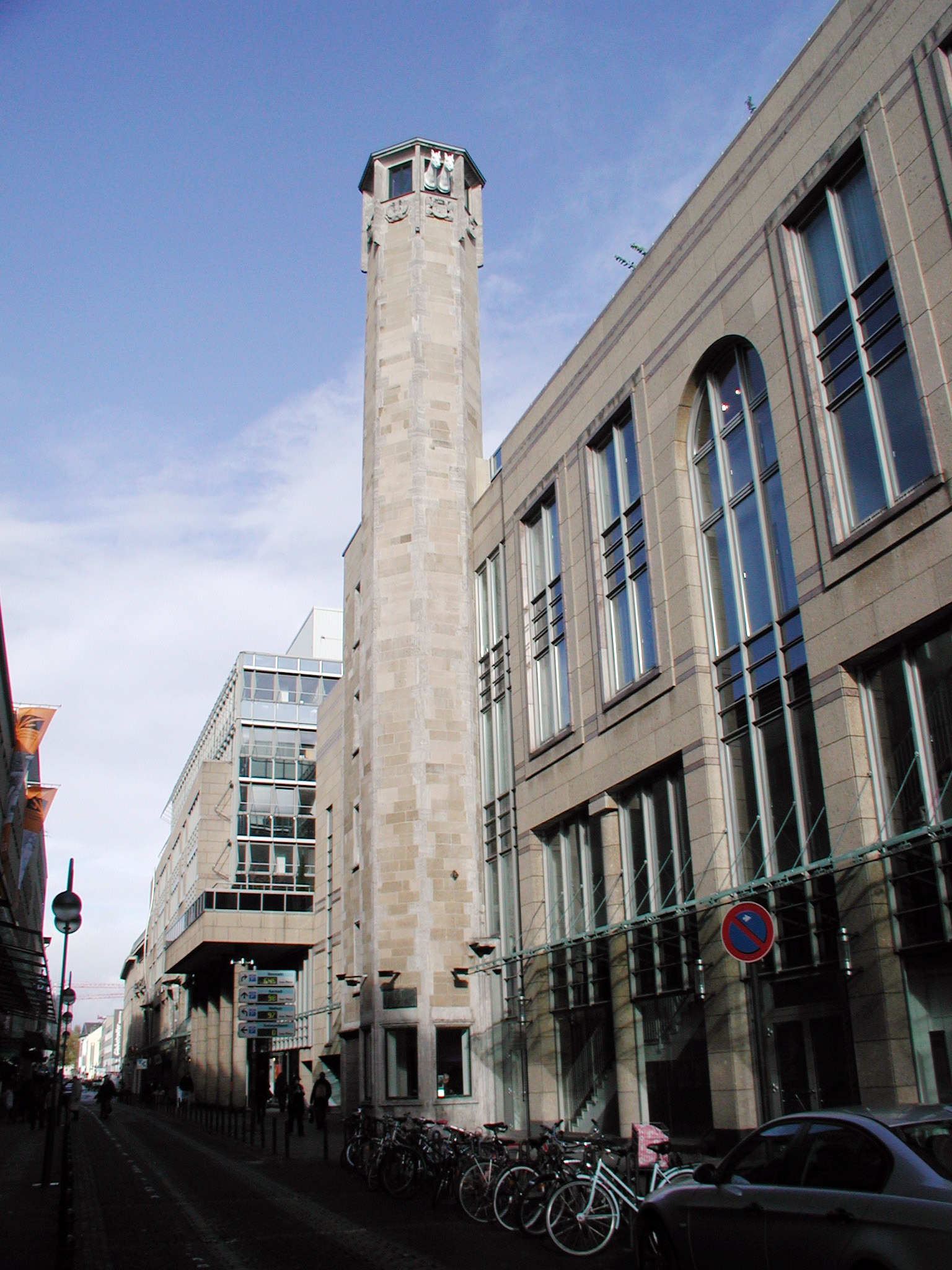 Richmodisturm Köln. 1958 ersetzt man die im Krieg zerstörten Köpfe durch Skulputren des Bildhauers "Müller-Maus".